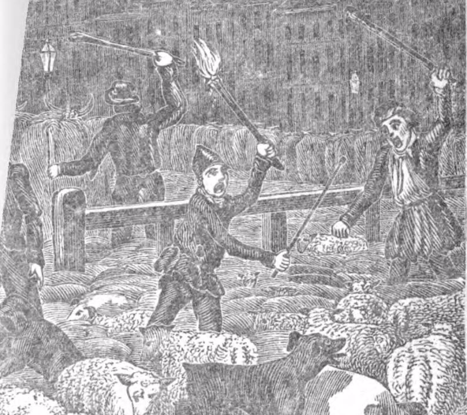 איור מתוך הספר Fragments in defence of animals and essays on morals soul and future state